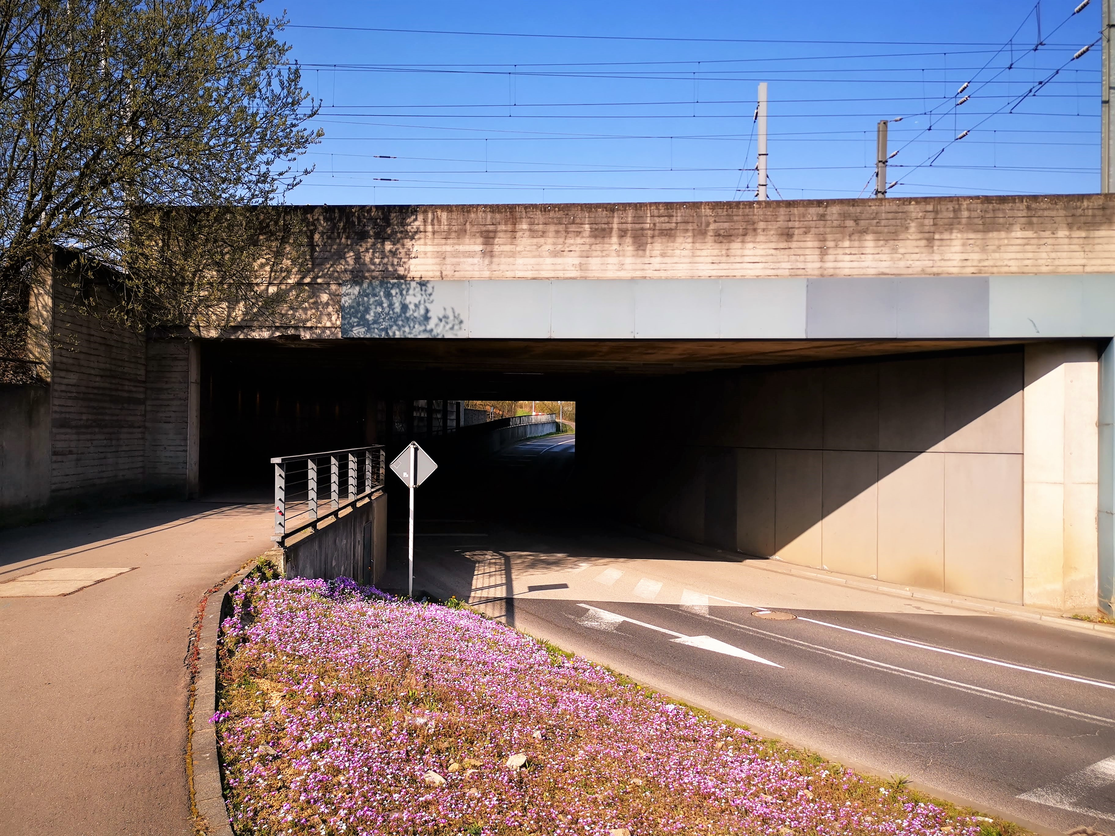 Luxembourg, Tunnel Rangwee. Accès Est (côté Howald). À gauche, le chemin cyclo-pédestre.